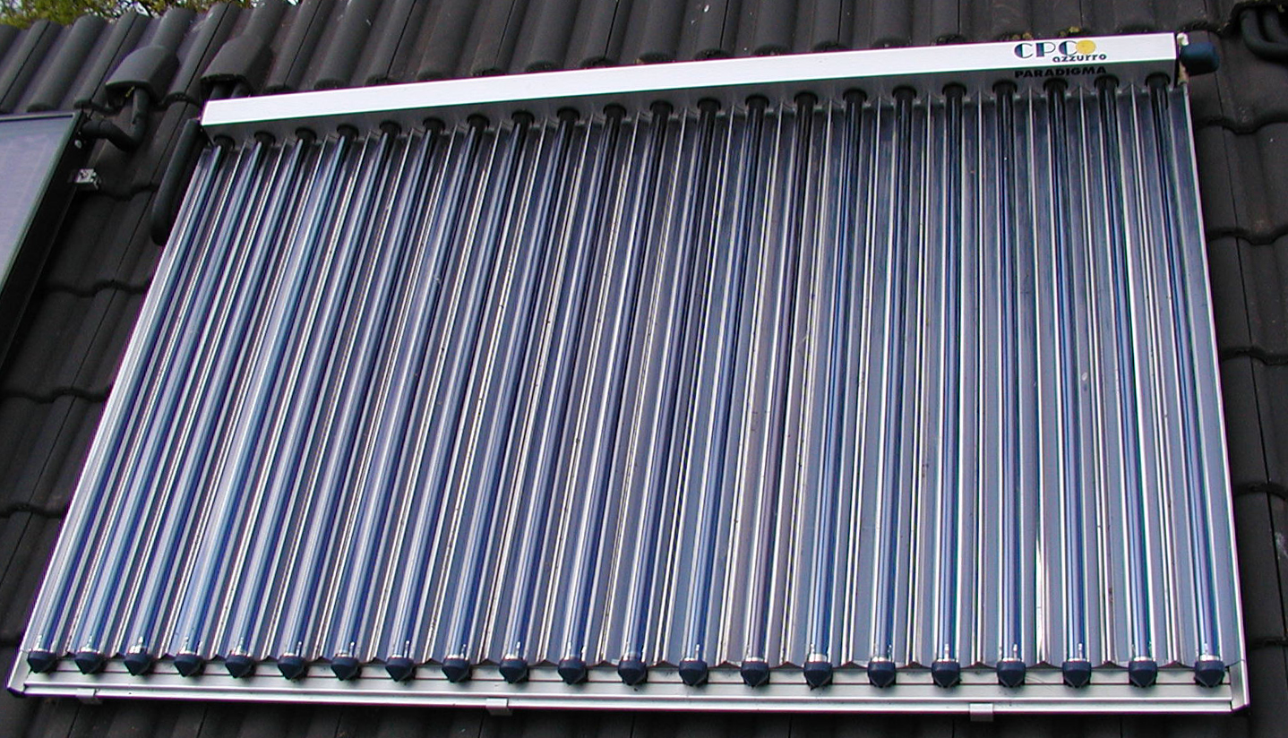 Vakuumröhrenkollektor